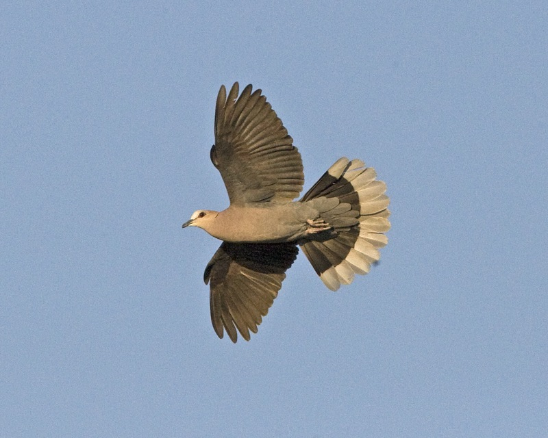 Streptopelia semitorquata, Moremi, Botswana